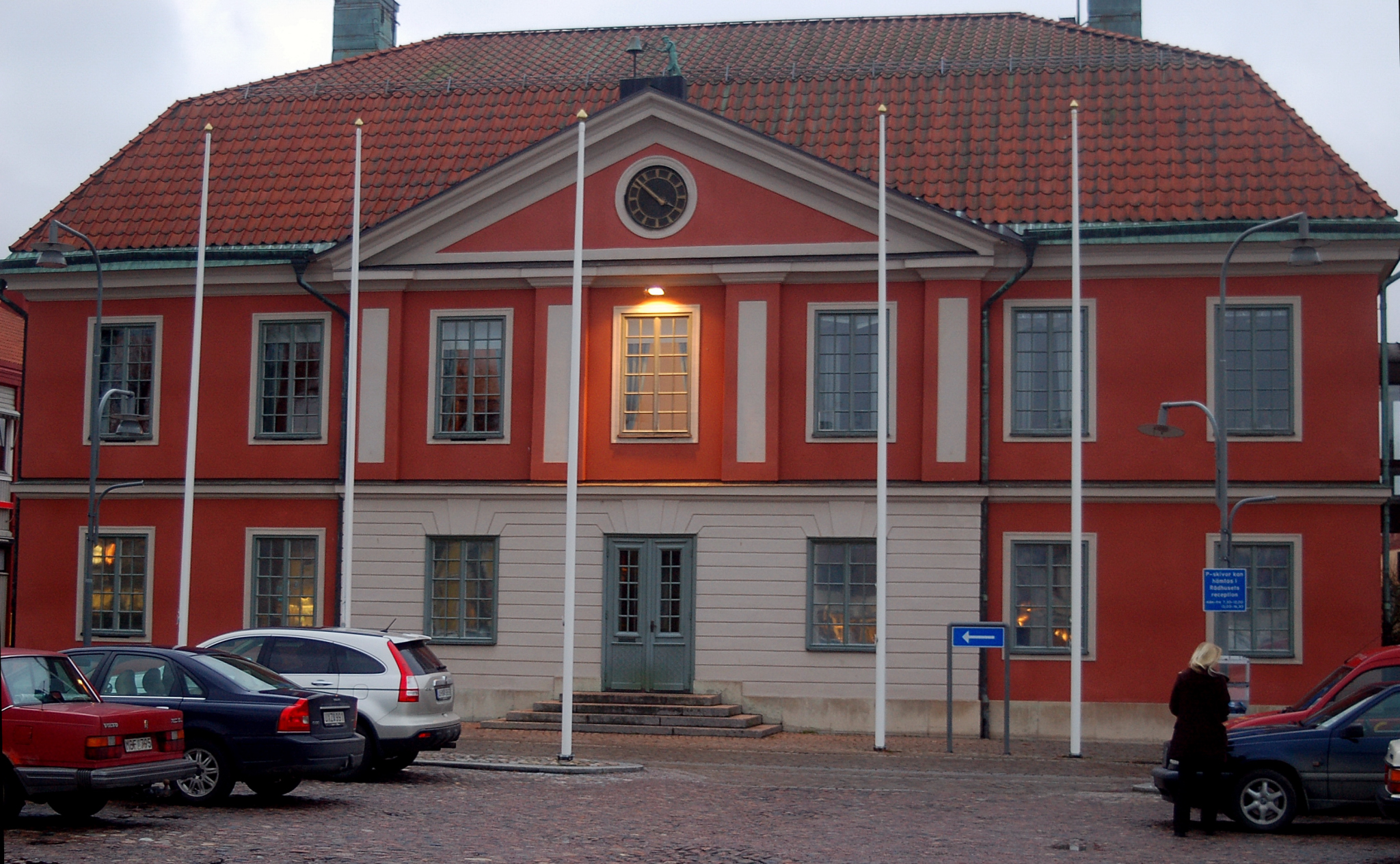 Askersund Rådhus, Askersund, Sweden